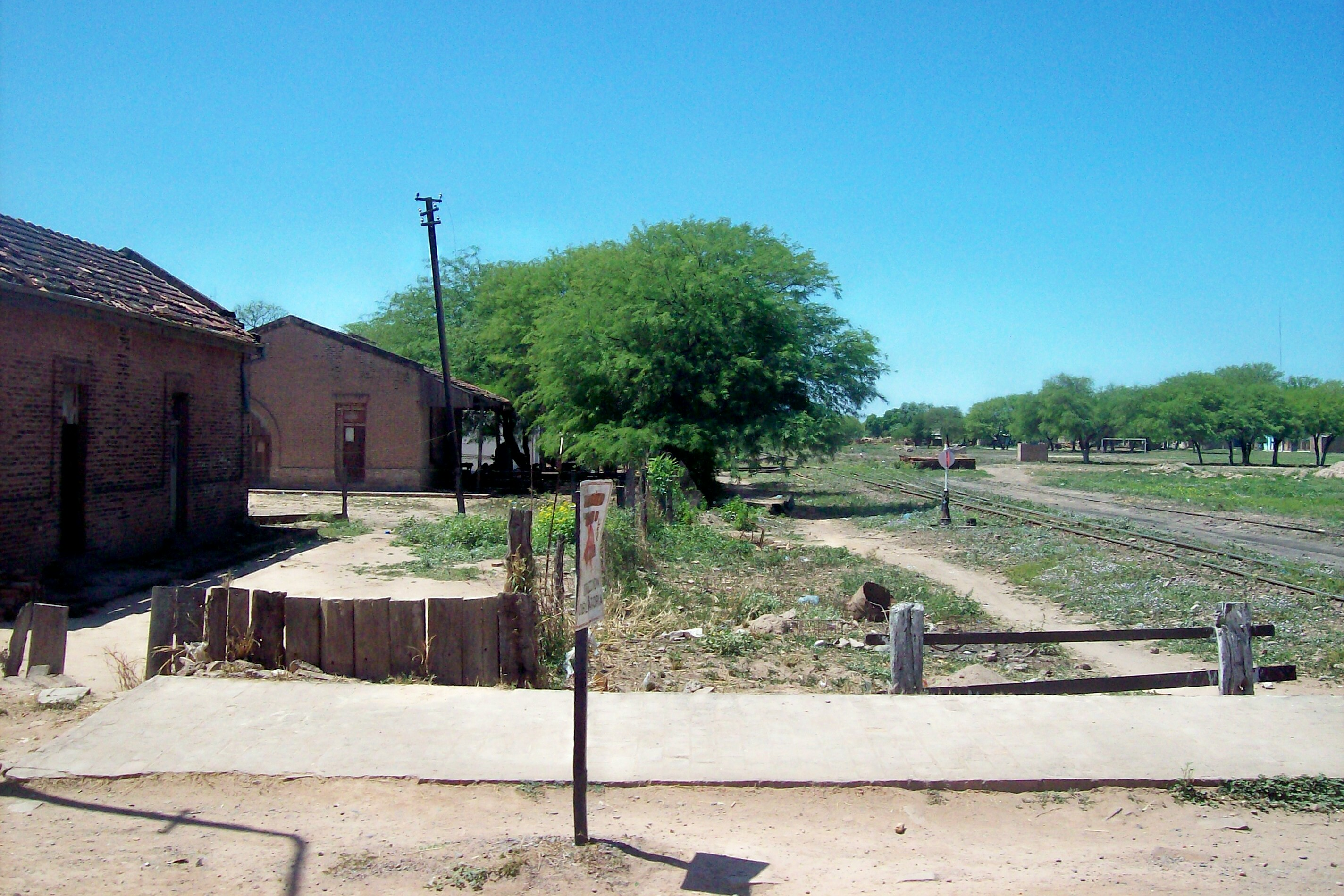 Monte Quemado, Copo, Provincia de Santiago del Estero, República Argentina. Estación de tren.